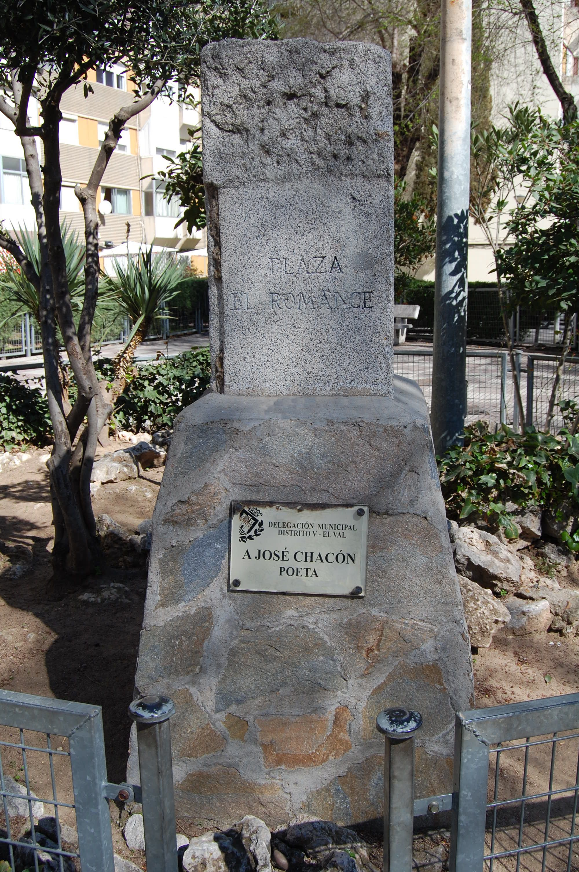 Monolito conmemorativo del poeta José Chacón. Ubicado en la plaza de El Romance de Alcalá de Henares (Comunidad de Madrid - España). Dedicado por la Delegación Municipal del Distrito V - El Val del Ayuntamiento de Alcalá de Henares.